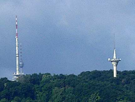 Fernmeldetürme in Stuttgart-Ost (im Hintergrund der Fernsehturm)